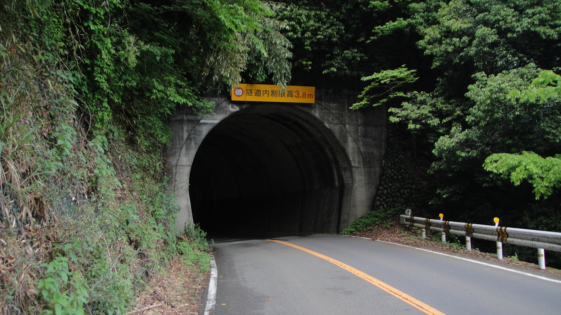 岳雲沢隧道